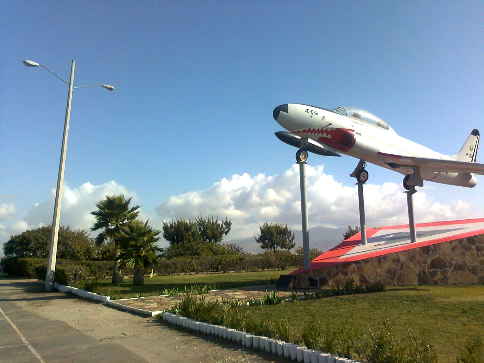 Base aerea Militar — Tijuana.